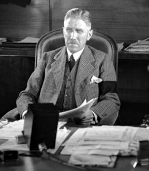 Reichskanzler von Papen spricht im Rundfunk zu dem amerik. Volk ! Reichskanzler von Papen in seinem Arbeitszimmer während der Rede zu den amerikanischen Hörern.